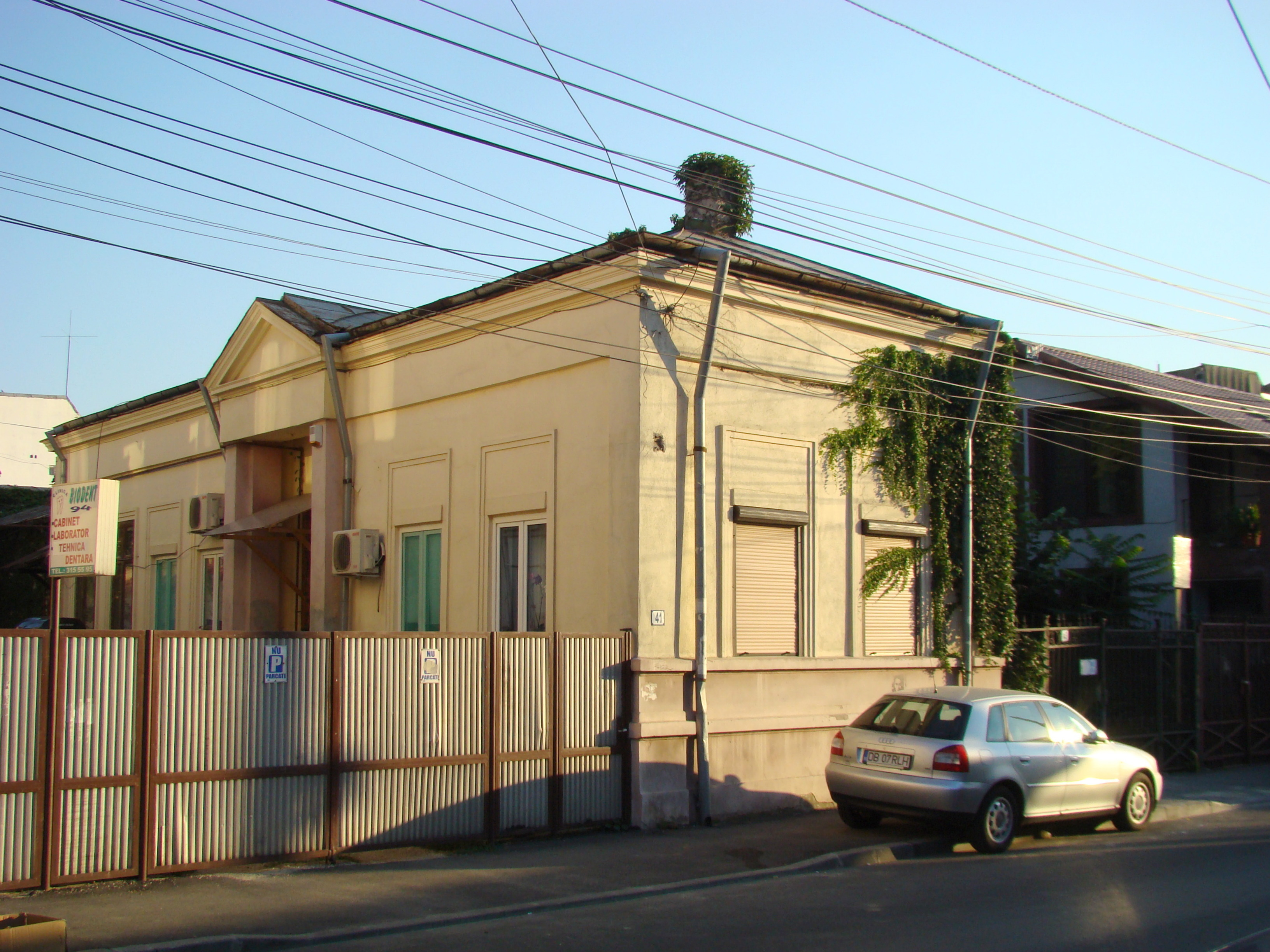 Clădire monument istoric, str. Mircea Vulcănescu, nr.41